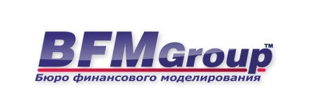 Инвестиционно - проектная компания BFM Group Ukraine